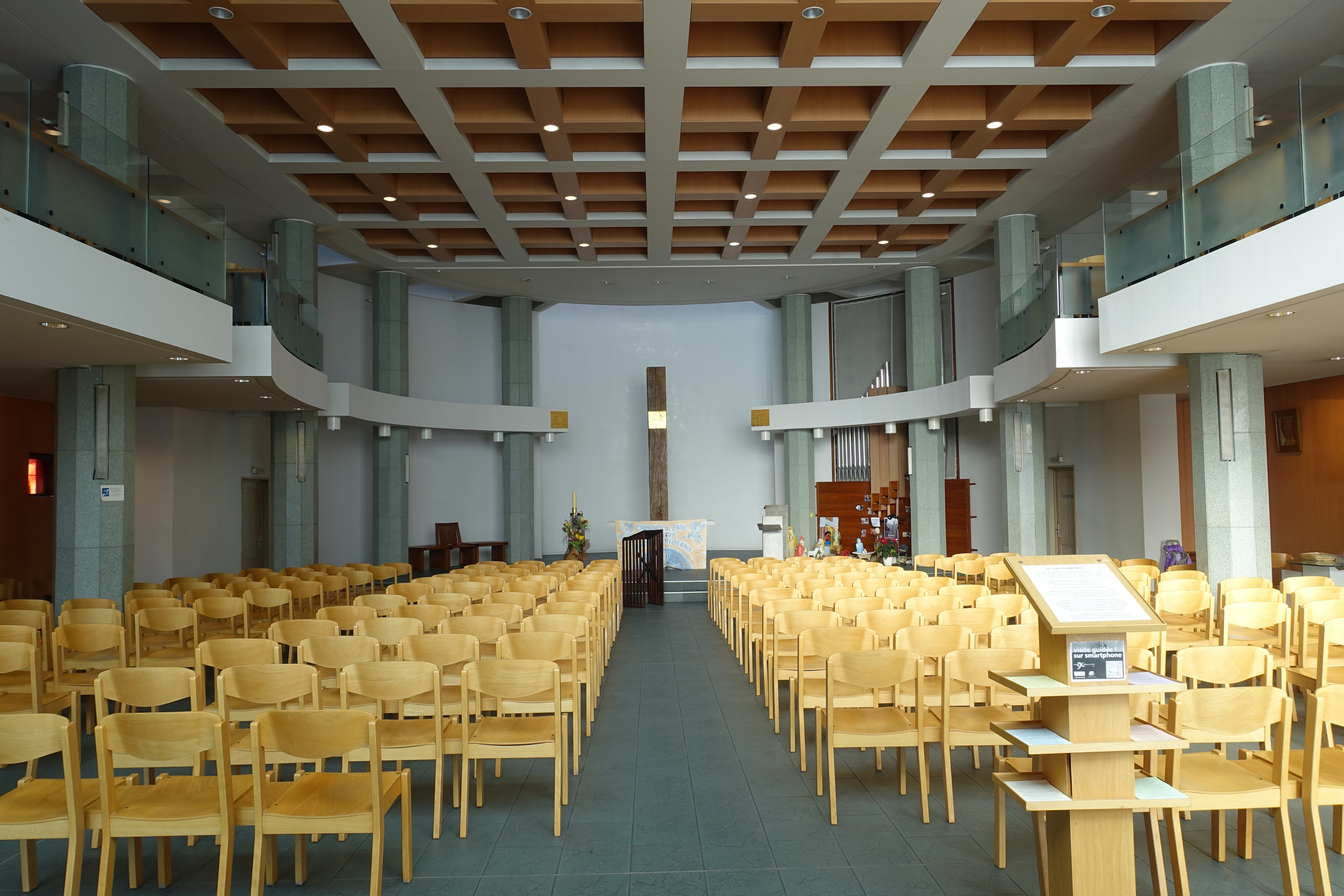 Eglise Notre-Dame d'Espérance @ Paris 11 Église Notre-Dame-d'Espérance, 47 rue de la Roquette, Paris, France.